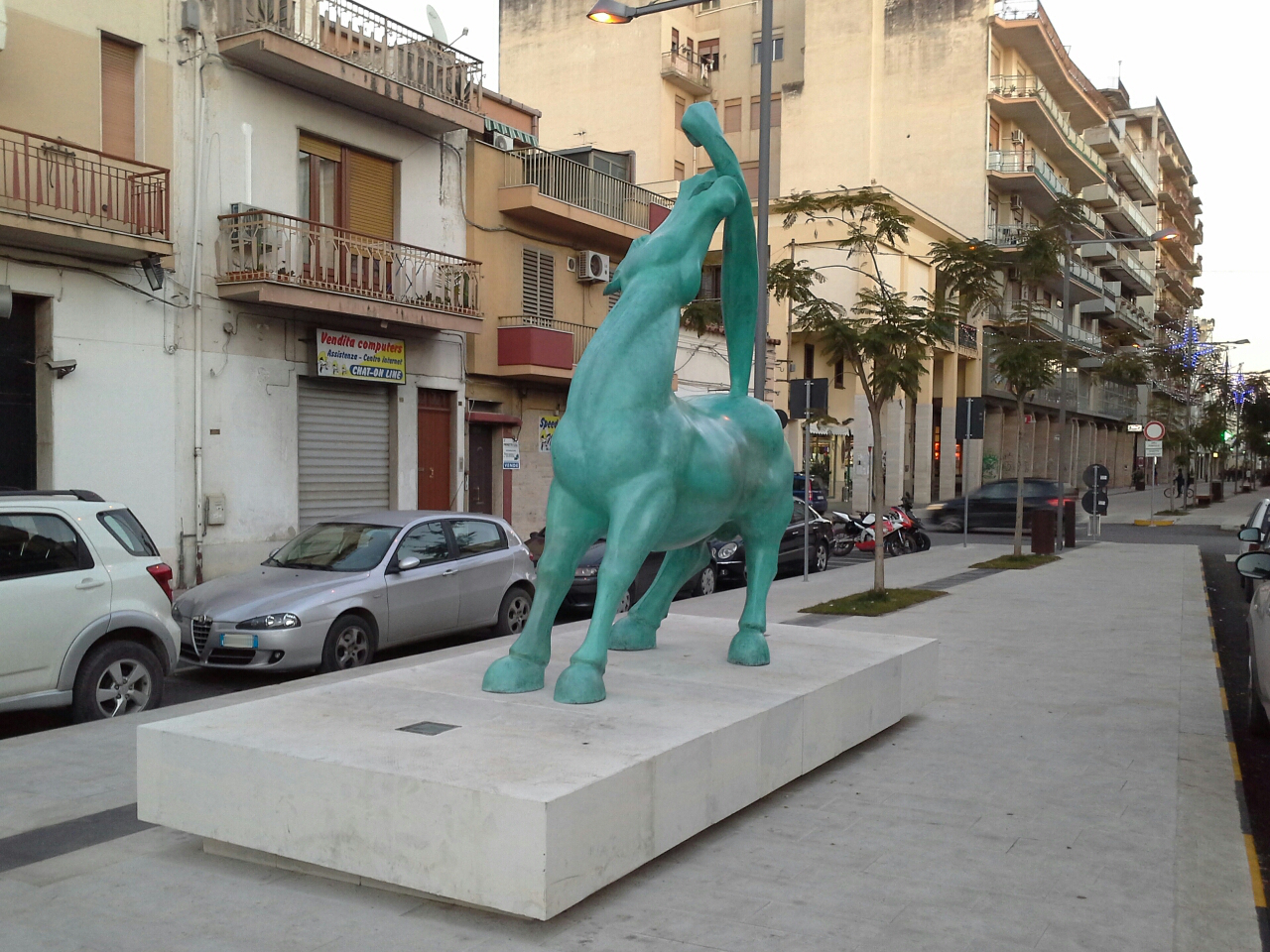 Foto di Scultura